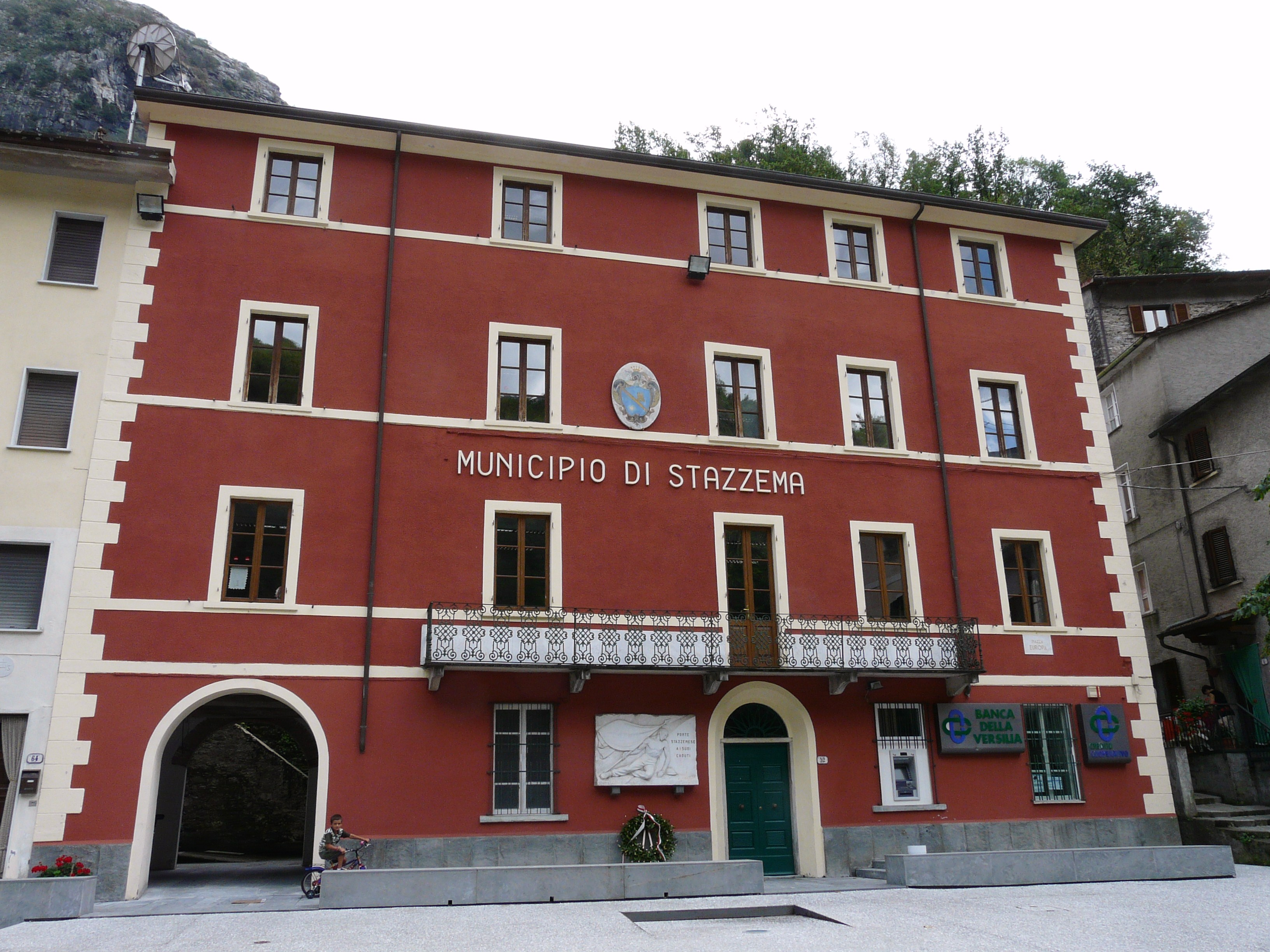 Municipio di Stazzema, Toscana, Italia